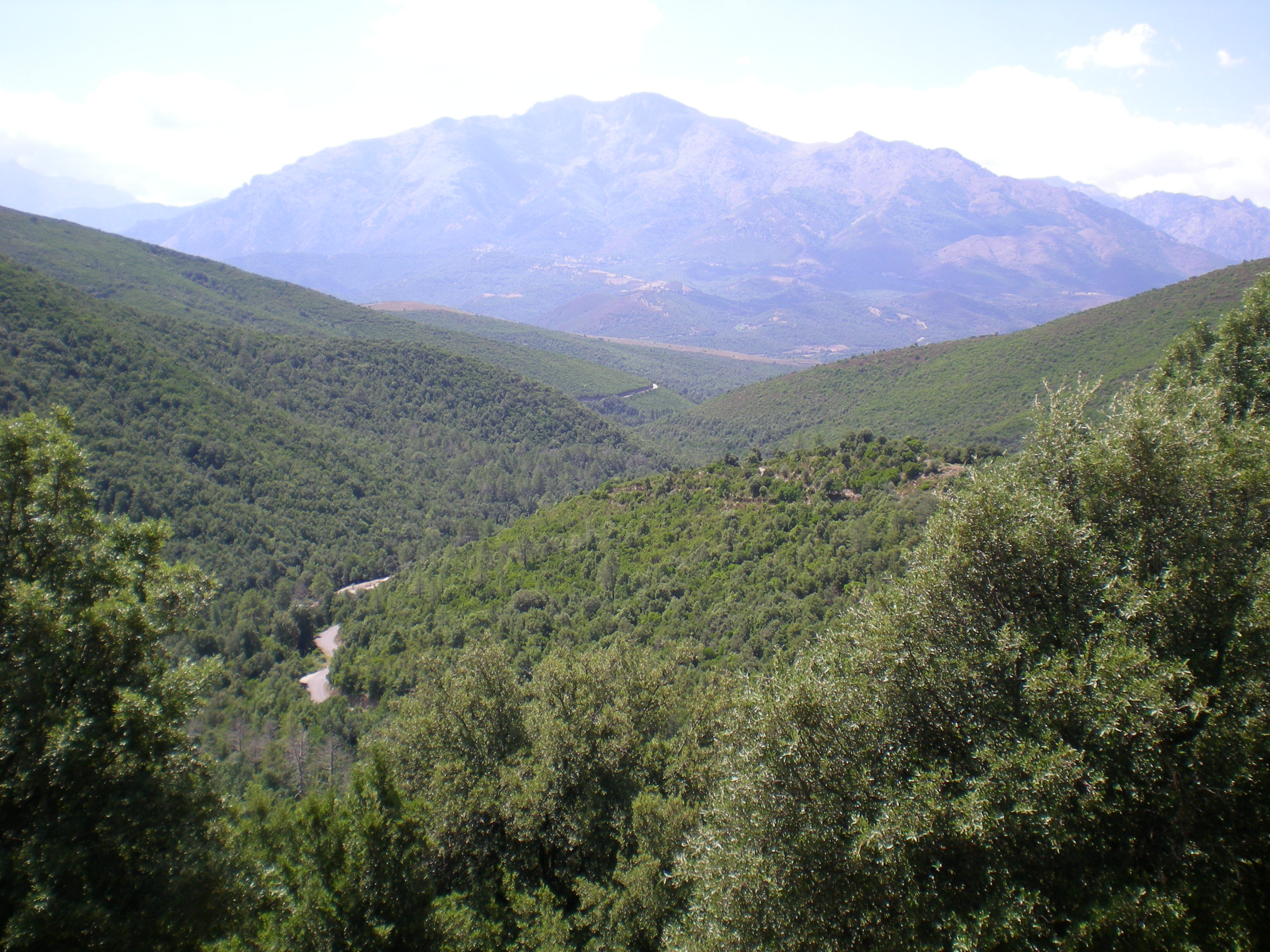 Monte Cardo depuis le village de Favalello di Bozio